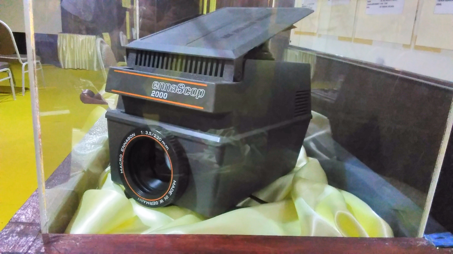 EnnaScop 2000 Projektor